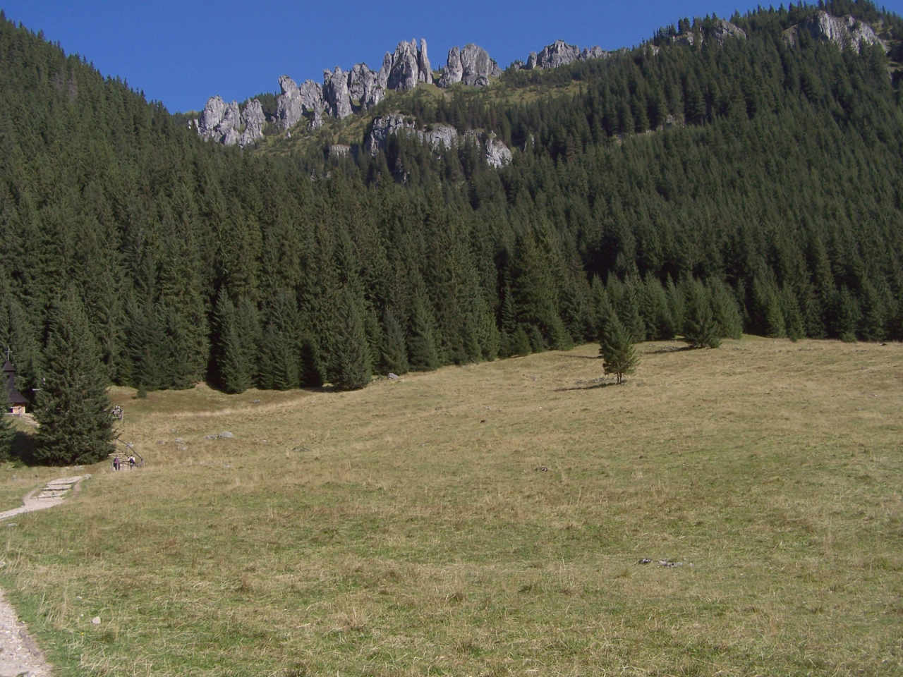 Mnichy Chochołowskie (Dolina Chochołowska)